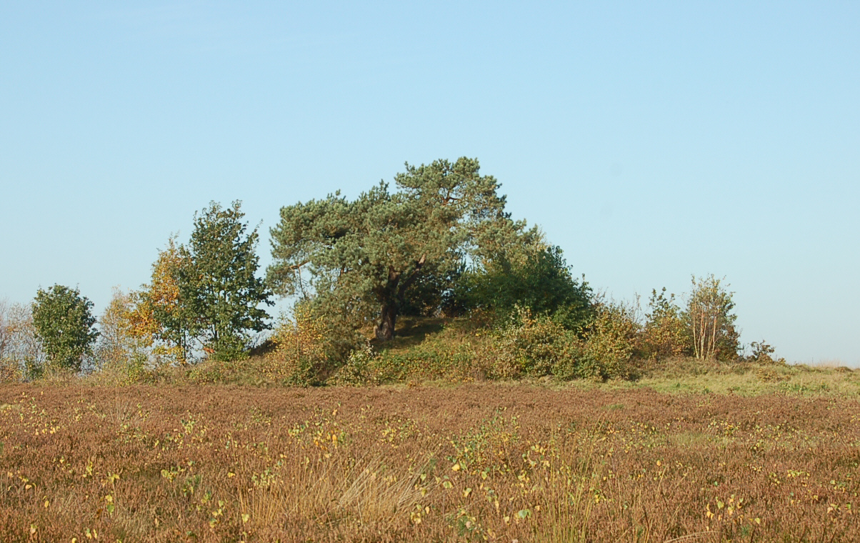 Der größte Grabhügen des Gräberfeldes von Langeln